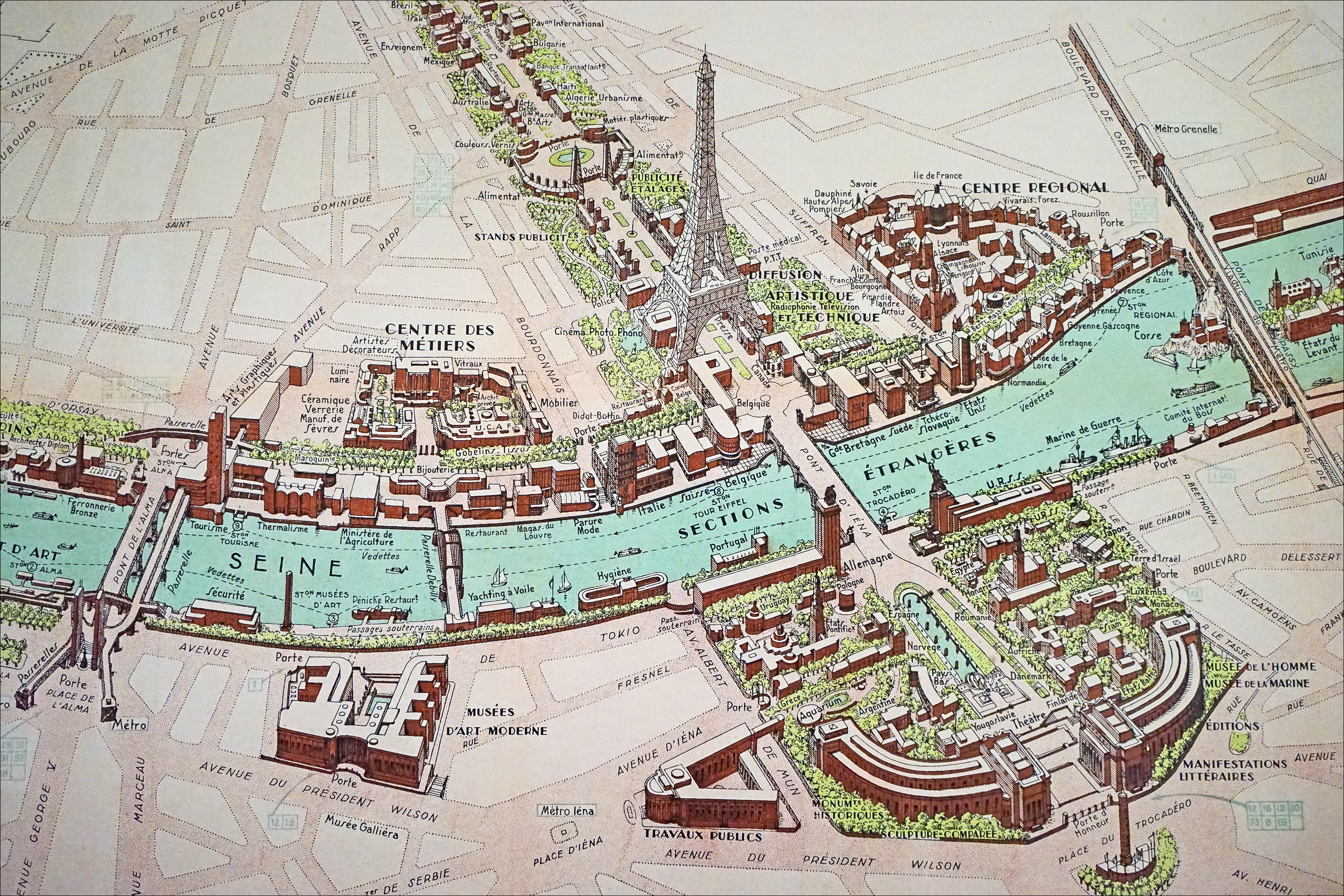 Détail de la carte de l'exposition de 1937 (zone du Trocadéro et de la Tour Eiffel) Le palais de Tokyo est construit pour accueillir le musée d'art moderne de la ville de Paris (toujours en place) et le Musée national d'art moderne (qui a déménagé au centre G. Pompidou). Le Palais d'Iéna, (pavillon des travaux publics, aujourd'hui conseil économique, social et environnemental) est construit par Auguste Perret, mais ne sera terminé qu'en 1946. Sur la carte, il est représenté terminé alors qu'en 1937 une seule aile a été édifiée. Article de Wikipedia sur l'exposition de 1937 Site de l'exposition Robert Delaunay au musée national d'art moderne (Centre Georges Pompidou)